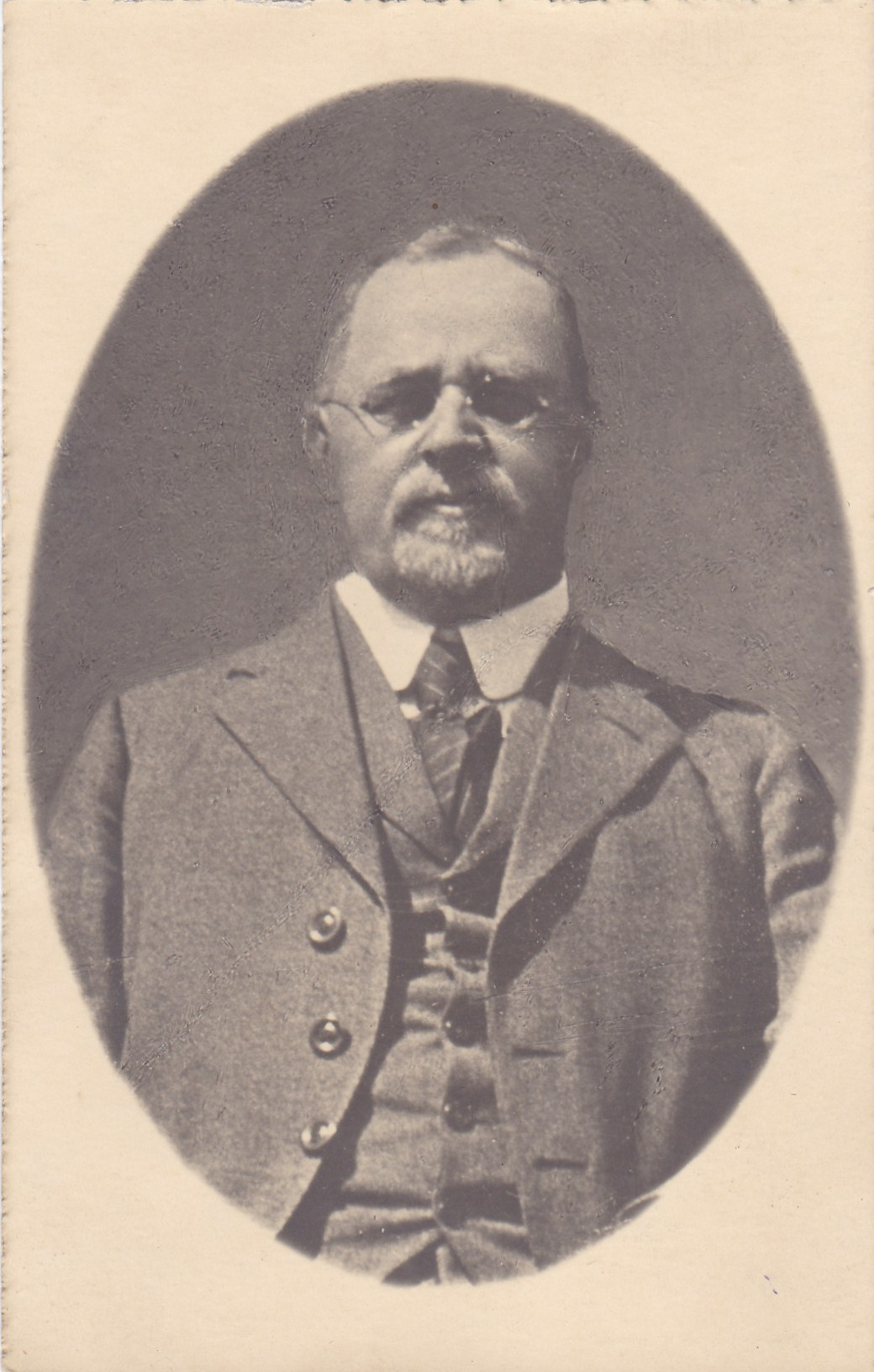 Johannes Hakenmüller, um 1910